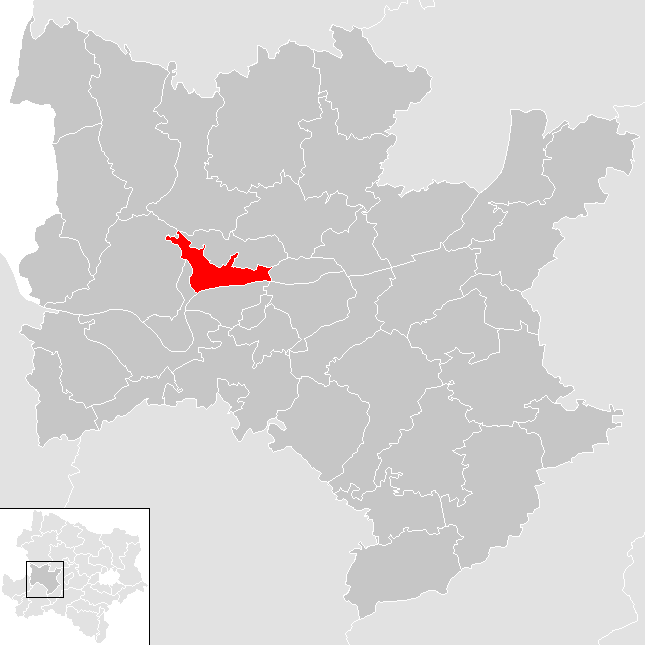 Bezirk Melk